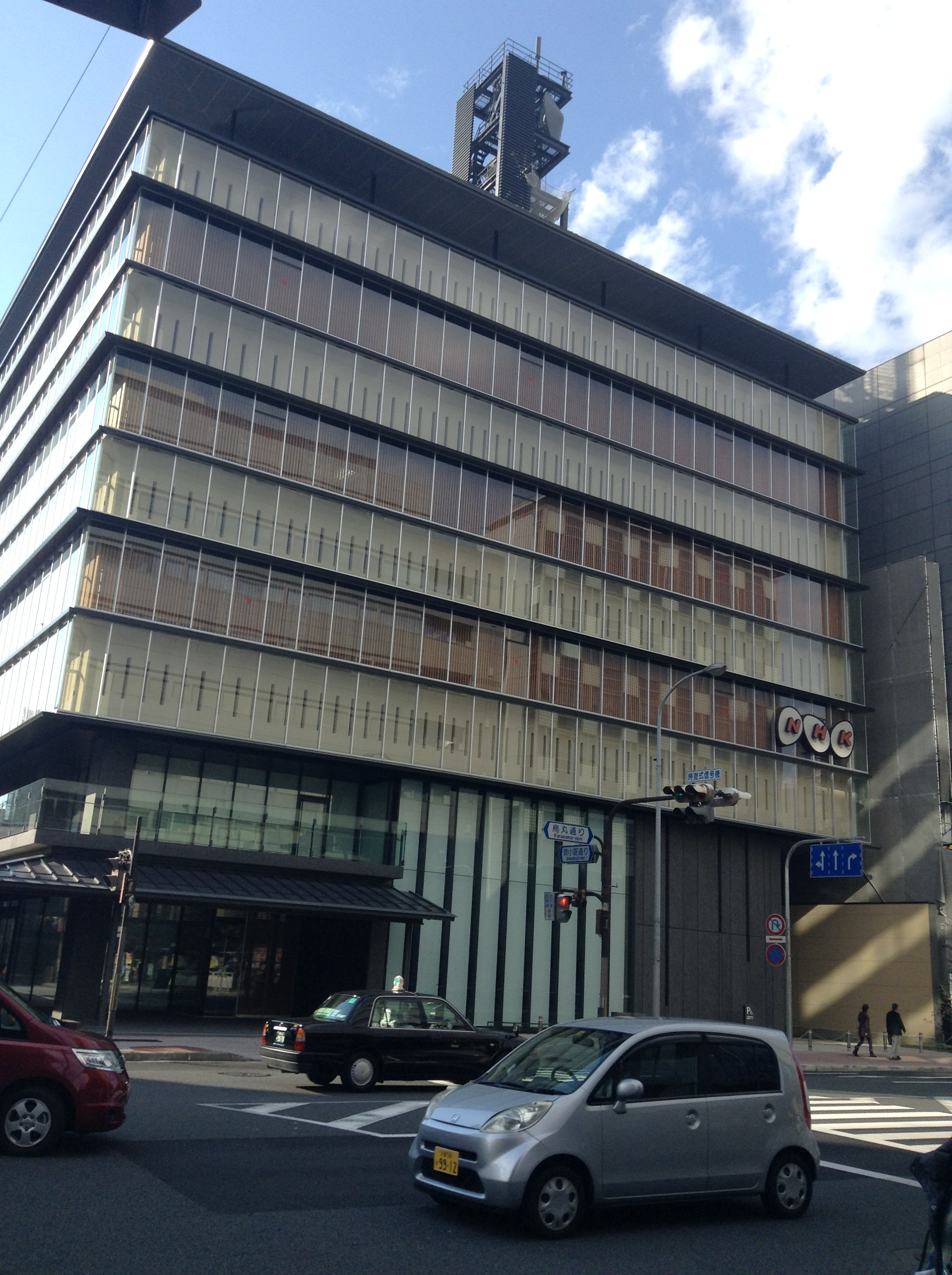 NHK京都放送局が2015年2月より運用開始する新局舎